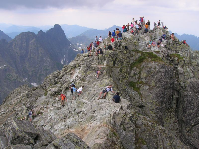 Rysy szczyt.